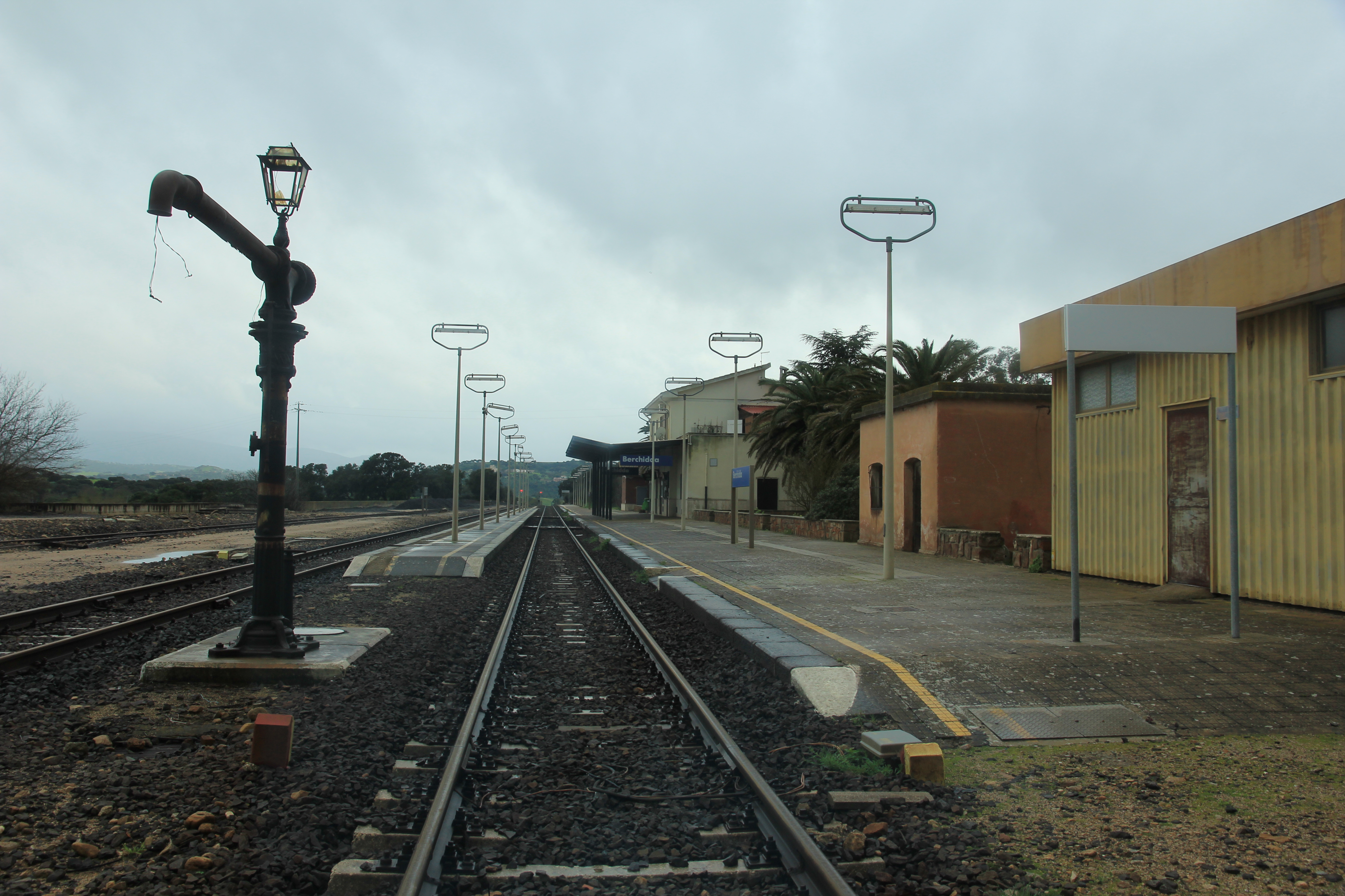 Berchidda - Stazione ferroviaria